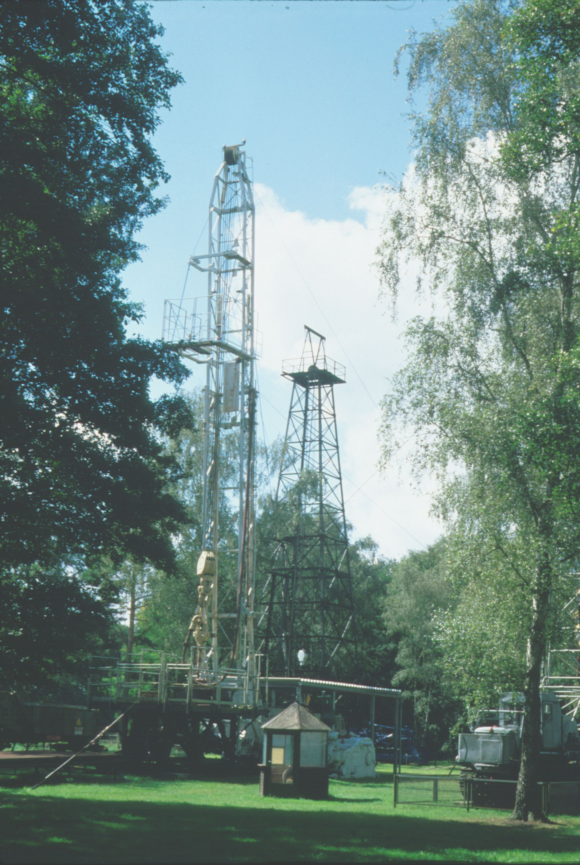 Deutsches Erdölmuseum Wietze, Freigelände